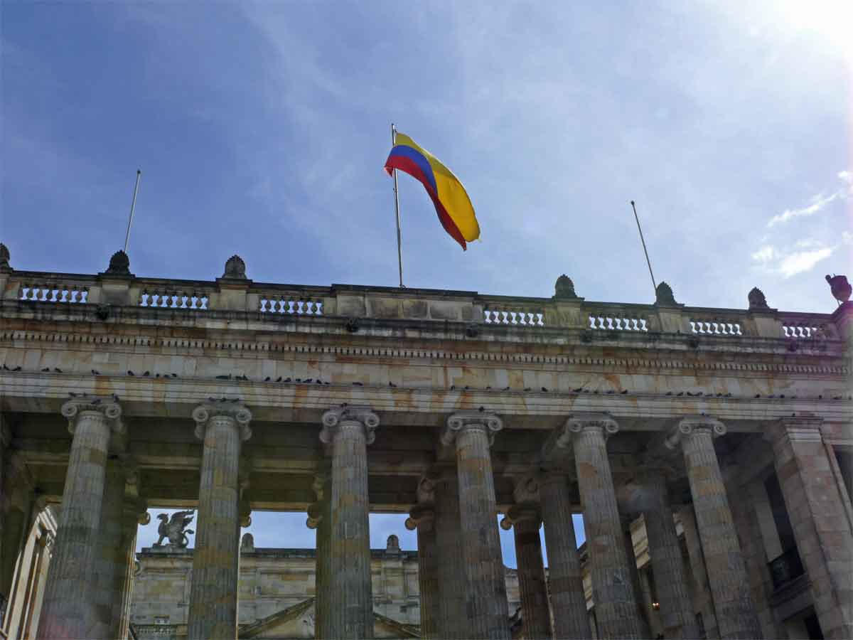 Capitolio Nacional, sede del Congreso de la República en Bogotá, Colombia.